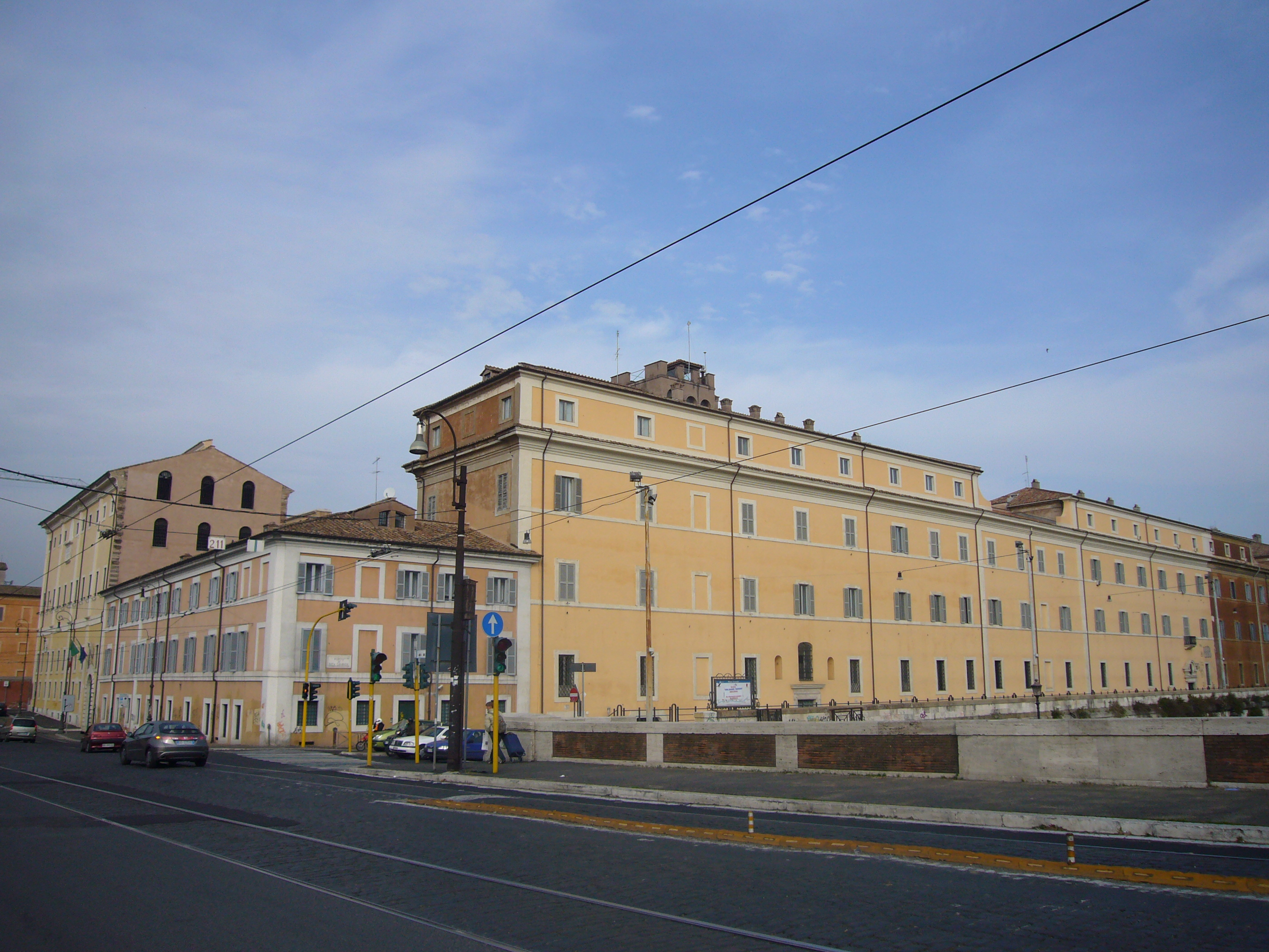 Roma, Porto di Ripa grande e complesso monumentale di San Michele a Ripa da ponte Sublicio